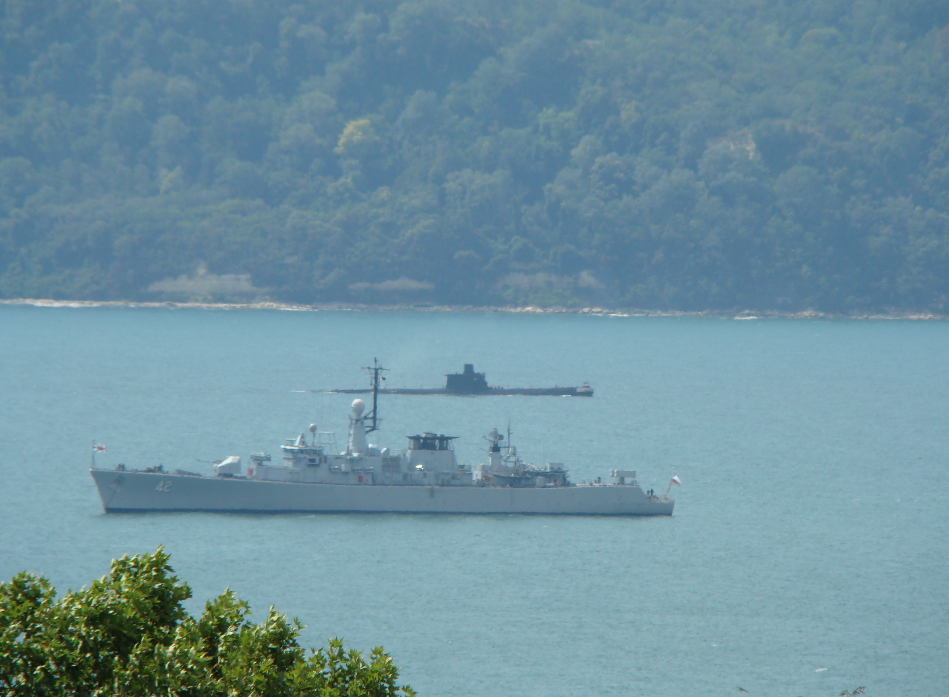 Фрегат "Верный"